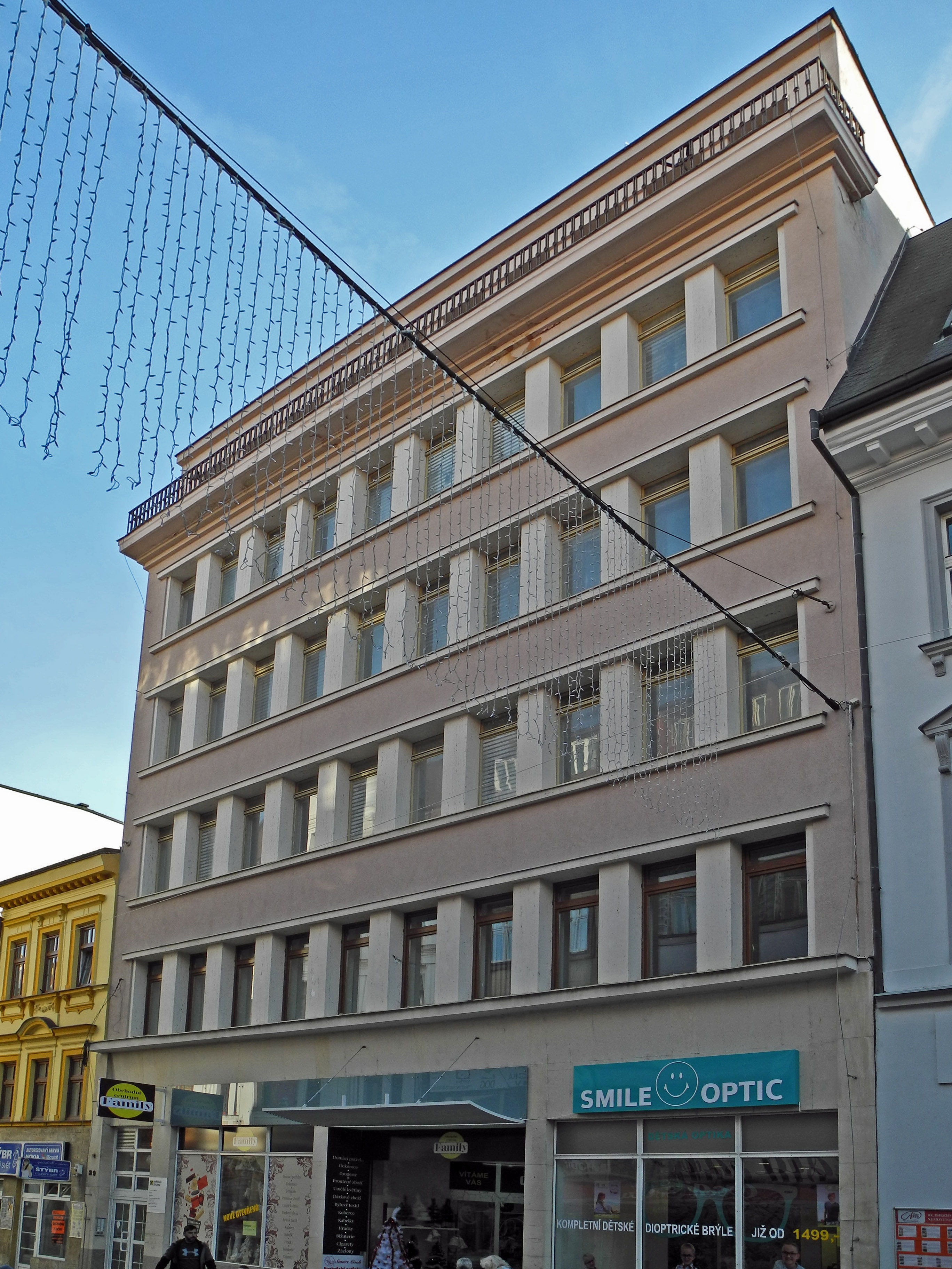 Geschäftshaus in Teplice, Krupská 29/28 (früher Teplitz, Graupnergasse)